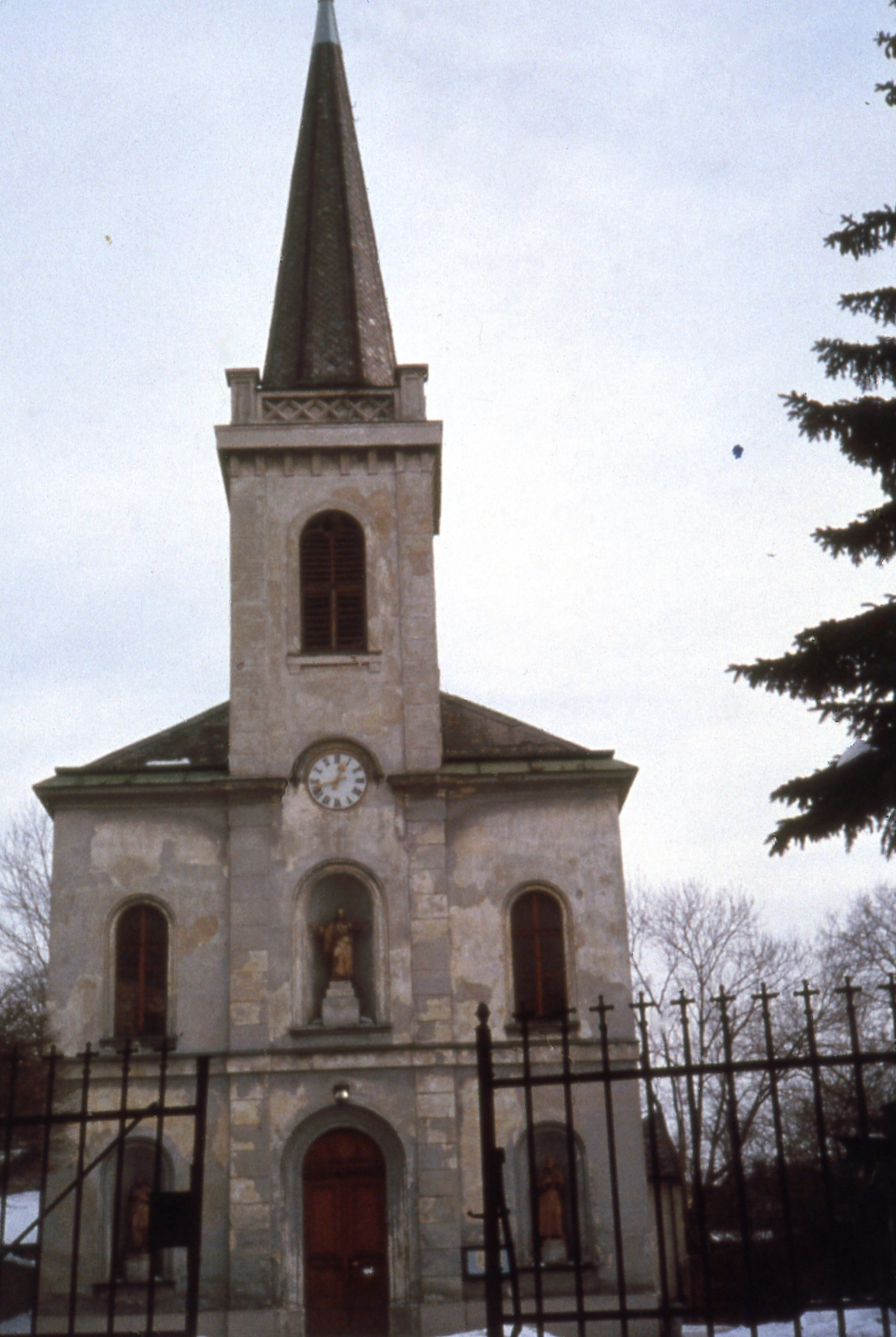 Unter St. Veit, alte Expositurkirche, errichtet 1867, abgebrochen 1965